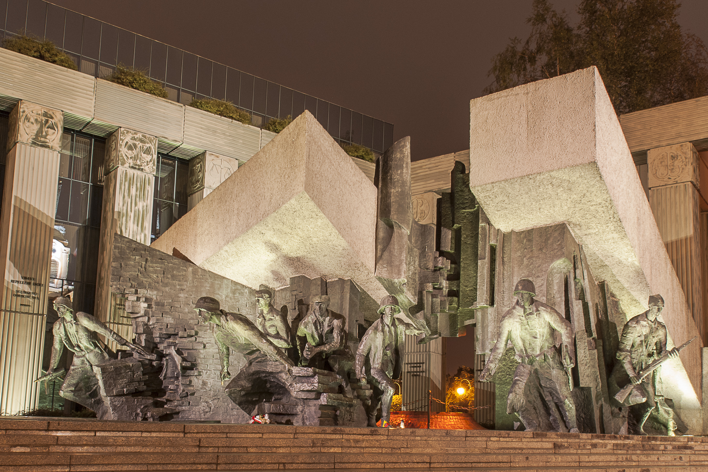 Budynek Sądu Najwyższego w Warszawie i jego najbliższego otoczenia, Plac Krasińskich, Warszawa Śródmieście